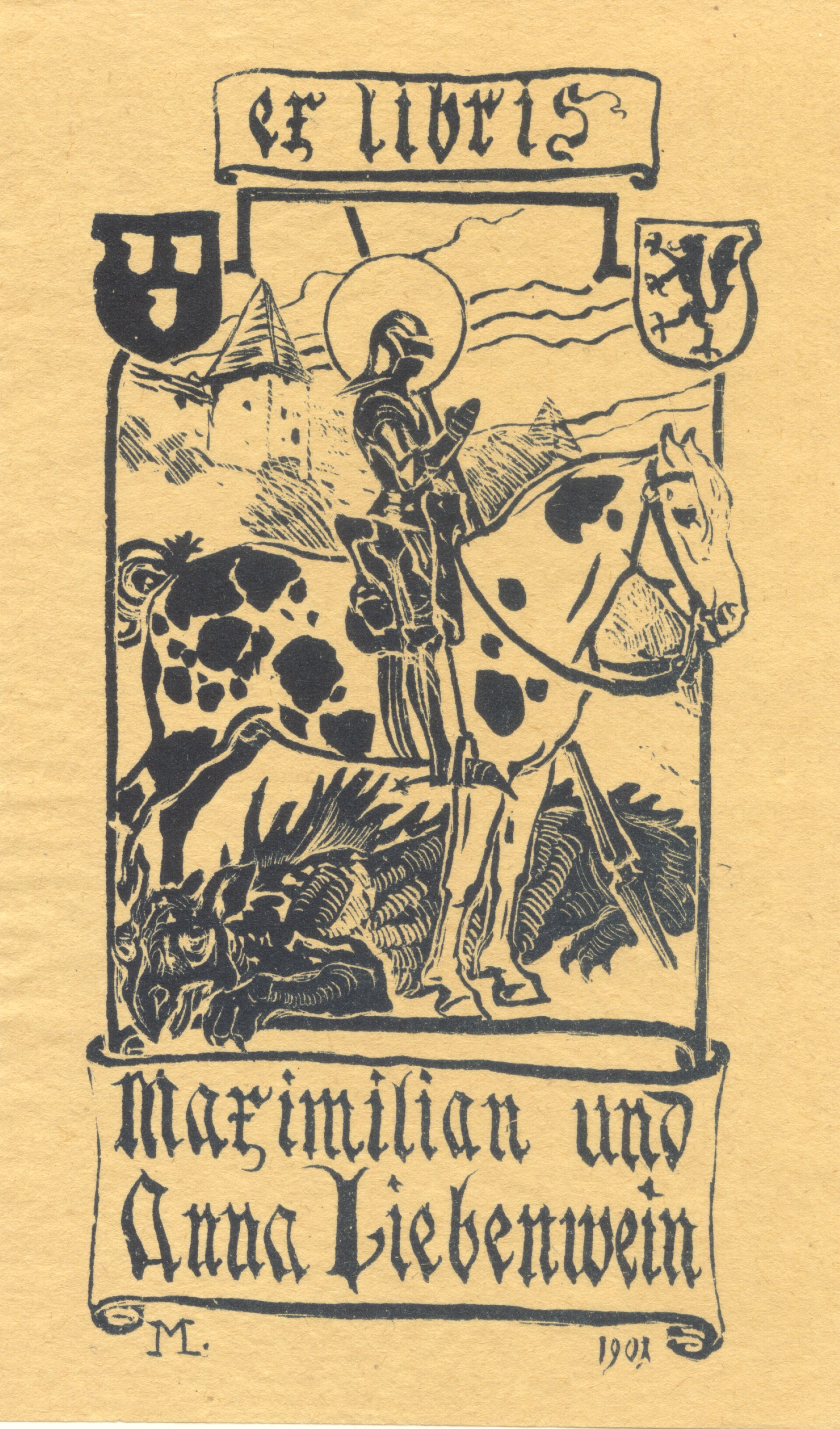 Exlibris von Maximilian und Anna Liebenwein, geschaffen von Max Liebenwein 1901